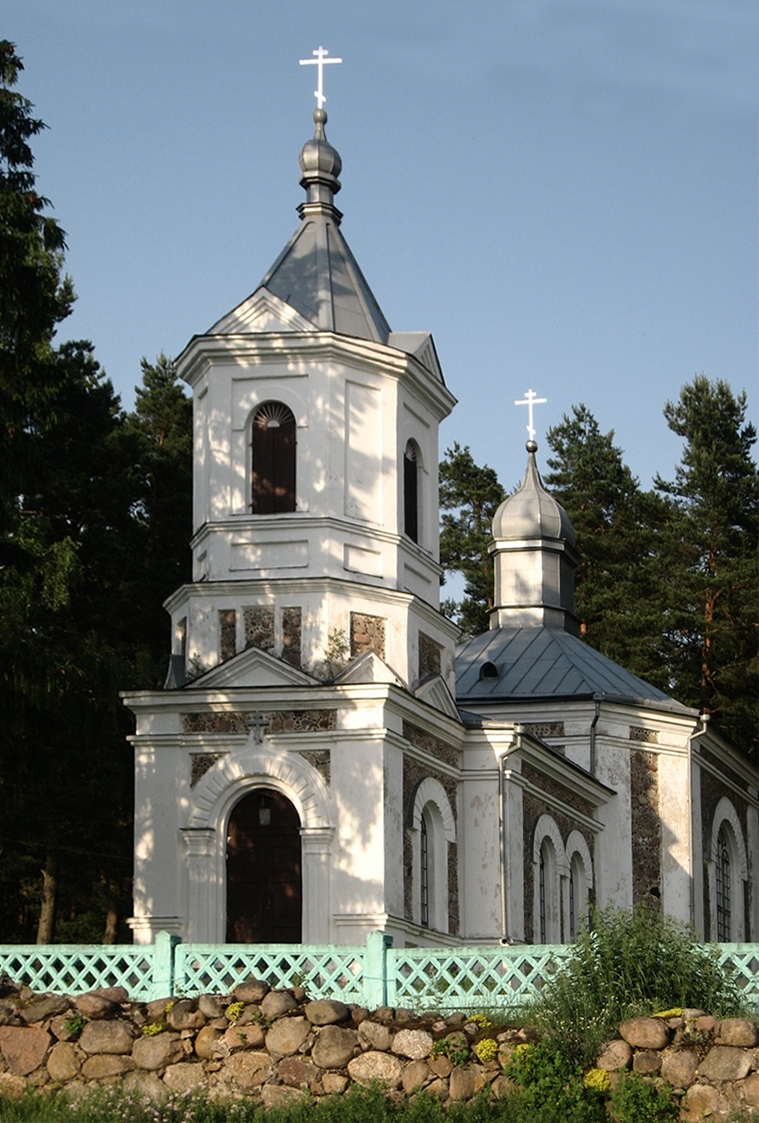 Беларуская (тарашкевіца): Спаса-Праабражэнская царква